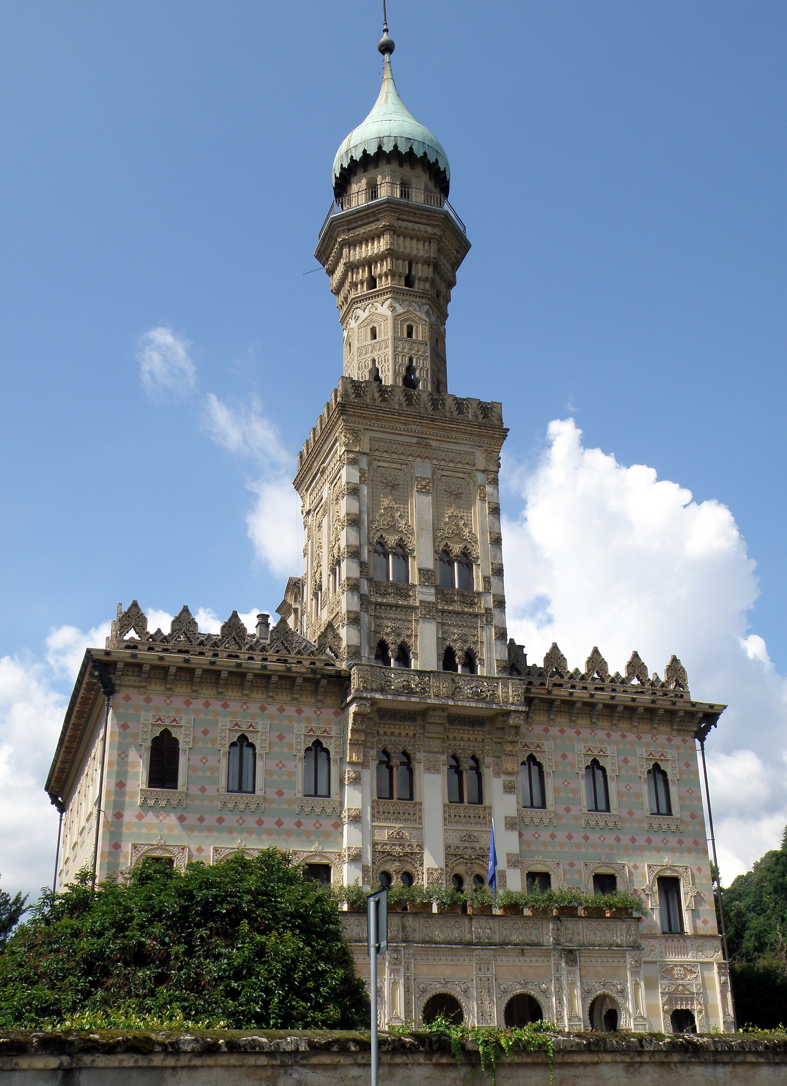 Orta San Giulio (prov. de Novare, région Piémont). Villa Crespi, fantaisie néo-mauresque située à l'entrée de la presqu'île d'Orta.